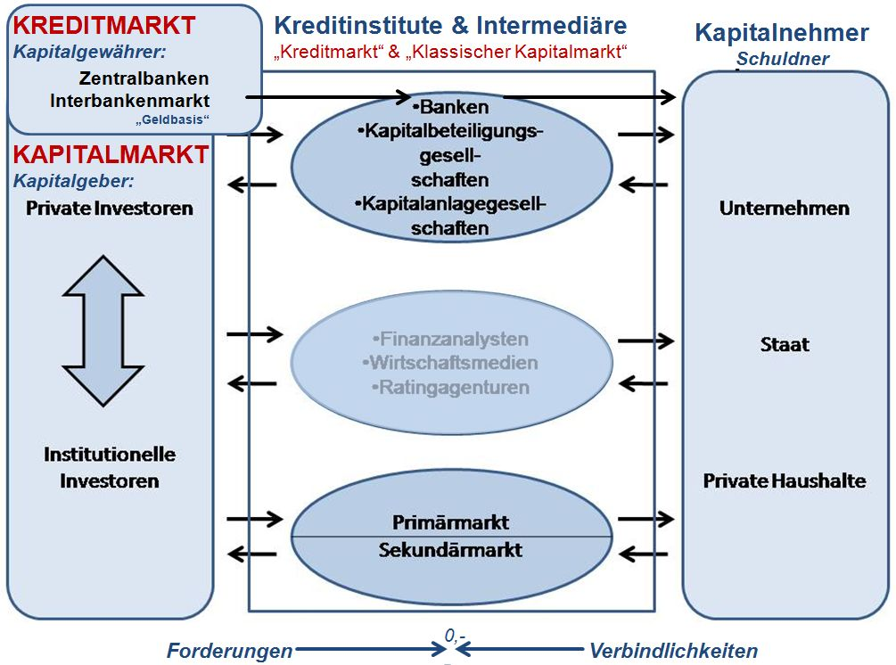 Akteure des Kapitalmarktes